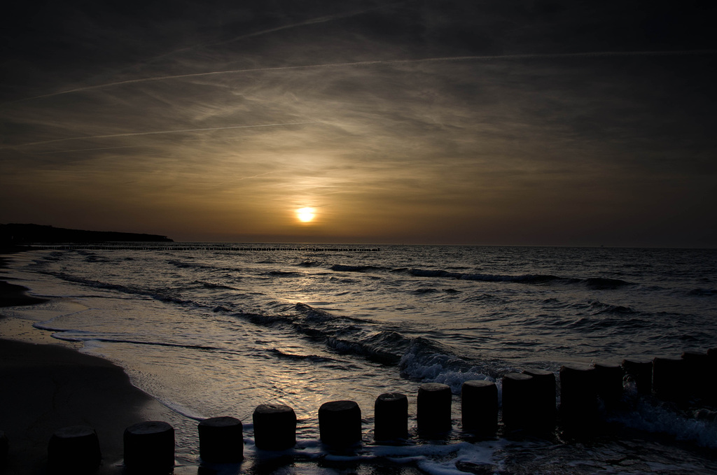 Fotos von Mecklenburg-Vorpommern